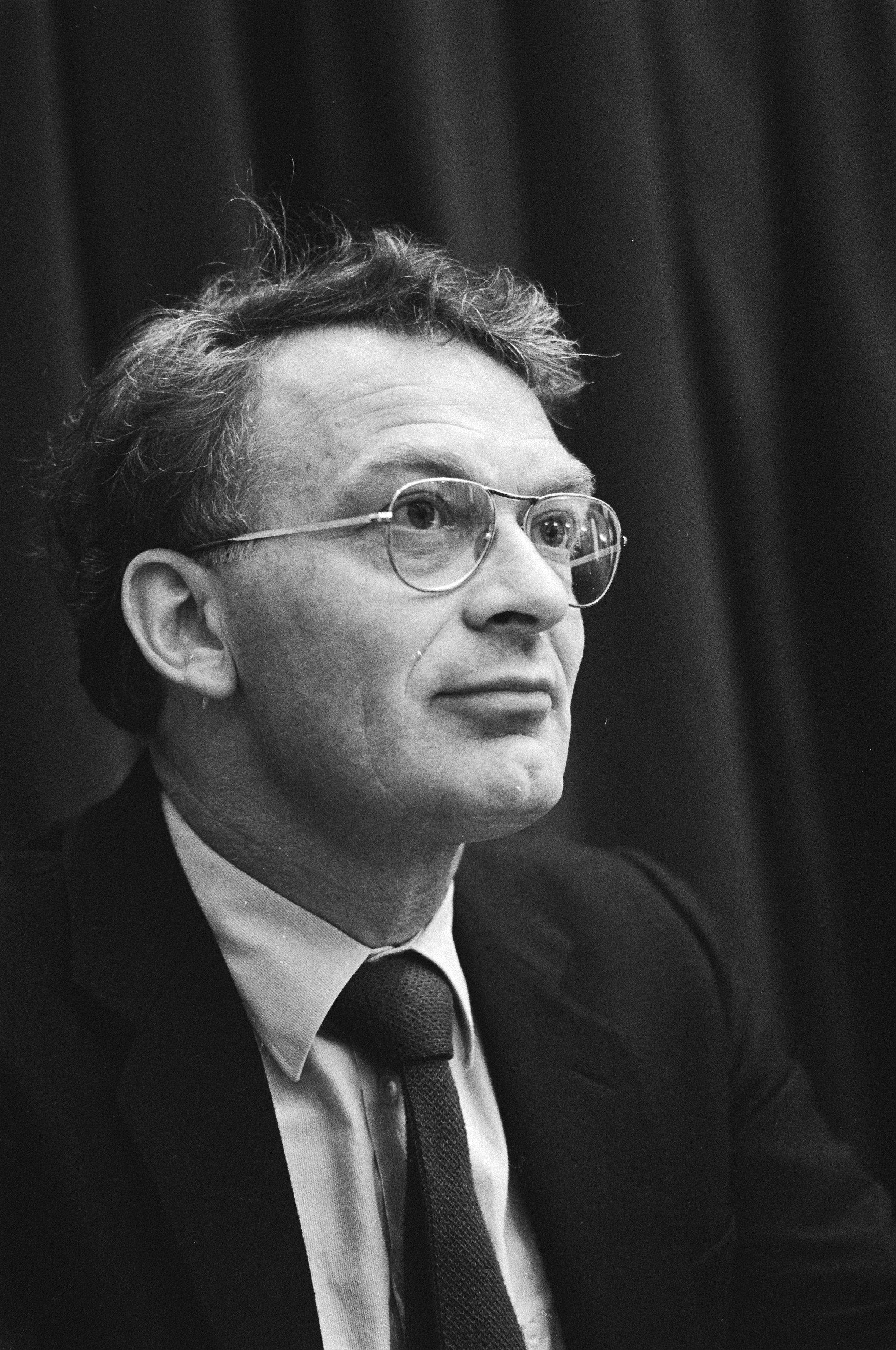 Collectie / Archief : Fotocollectie Anefo Reportage / Serie : Tweede Kamer Beschrijving : Dhr. Hans Janmaat (Centrumpartij) Datum : 6 september 1983 Locatie : Den Haag, Zuid-Holland Trefwoorden : parlementariërs, portretten Persoonsnaam : Janmaat, J.G.H. Instellingsnaam : Tweede Kamer Fotograaf : Marcel Antonisse Auteursrechthebbende : Nationaal Archief Materiaalsoort : Negatief (zwart/wit) Nummer archiefinventaris : bekijk toegang 2.24.01.05 Bestanddeelnummer : 932-6890